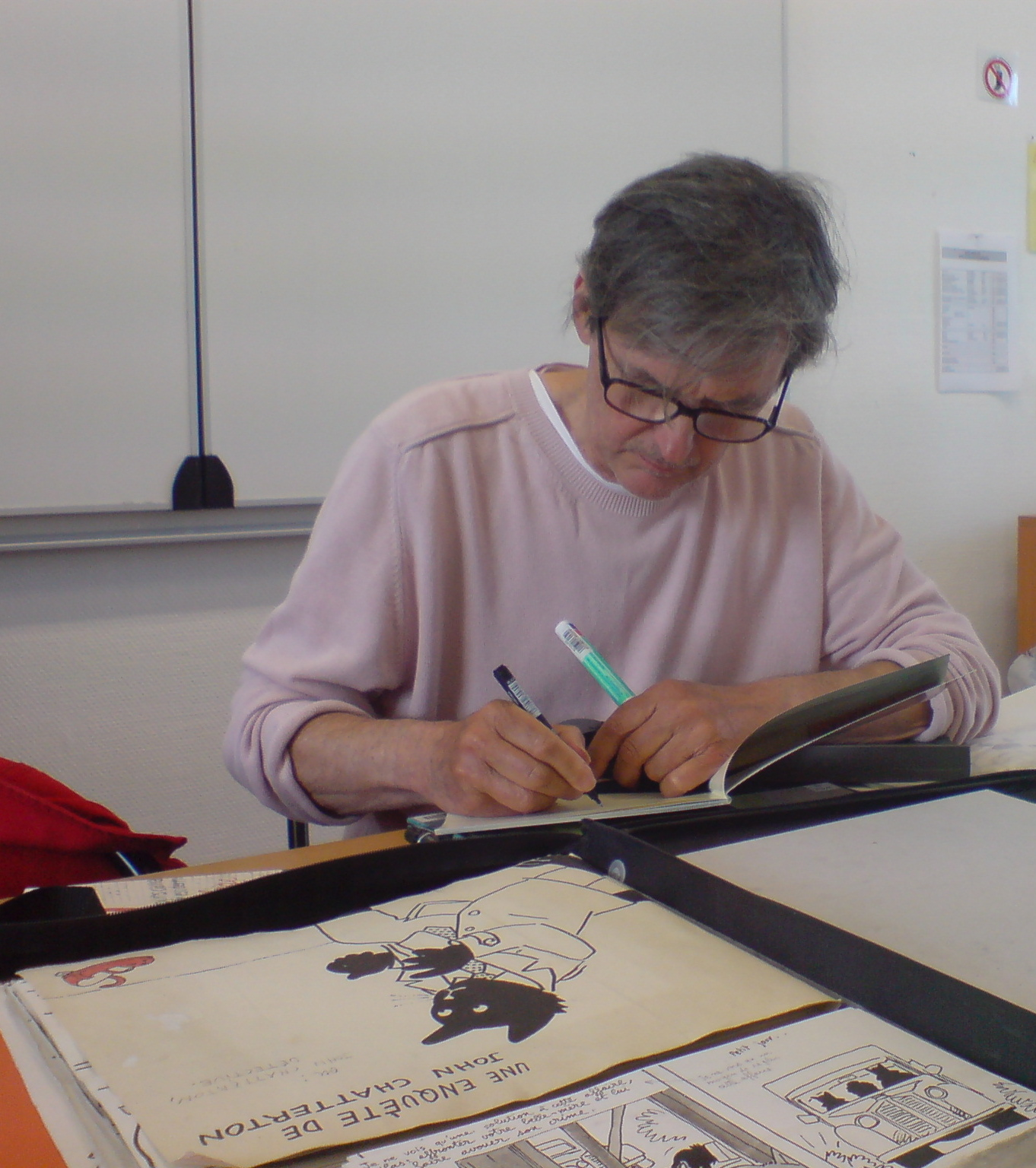 L’illustrateur pour enfants Yvan Pommaux, en train de dédicacer ses œuvres, au milieu de planches originales.